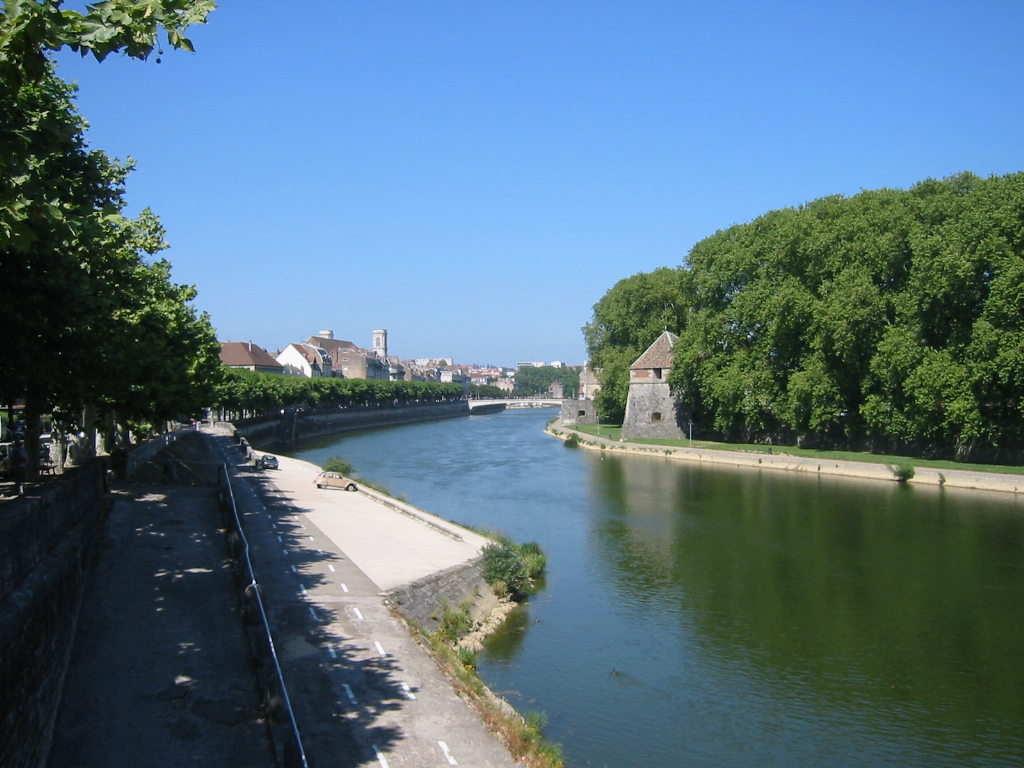 Photo du Doubs ( le fleuve ) dans Besançon